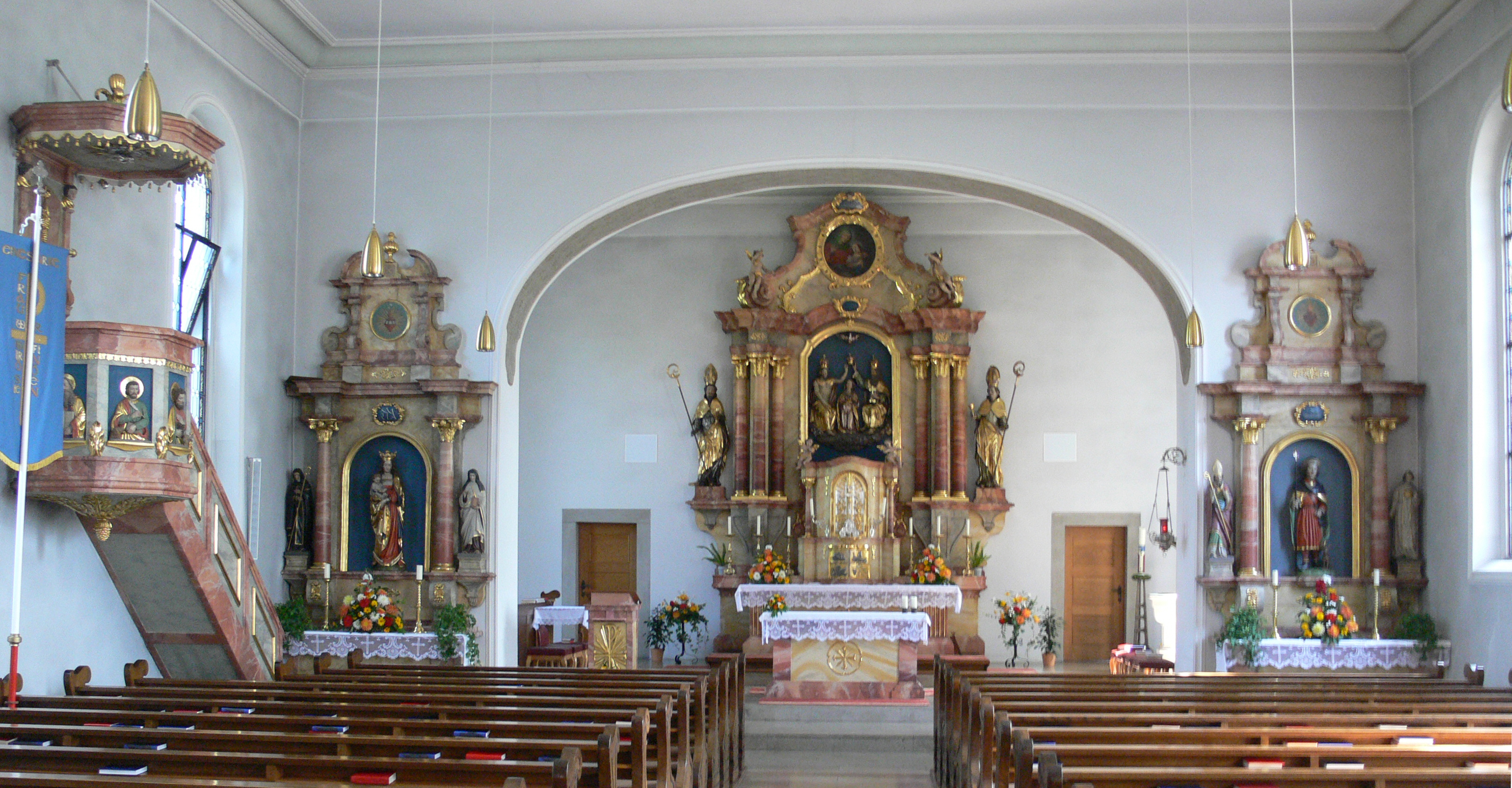 Pfarrkirche St. Anna, Vogt, Landkreis Ravensburg Blick zum Chor